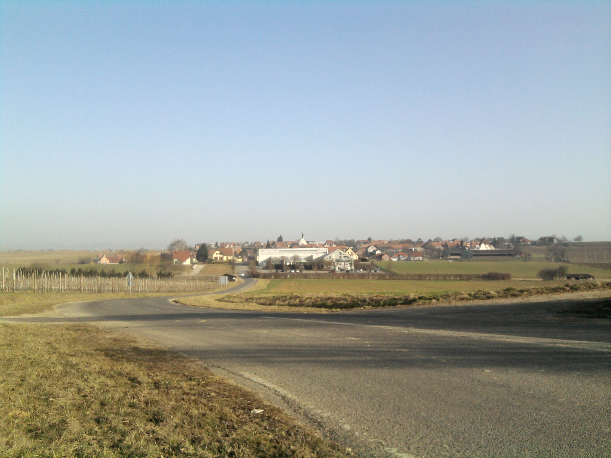 Vue depuis le lieu-dit "Les Trois Croix"